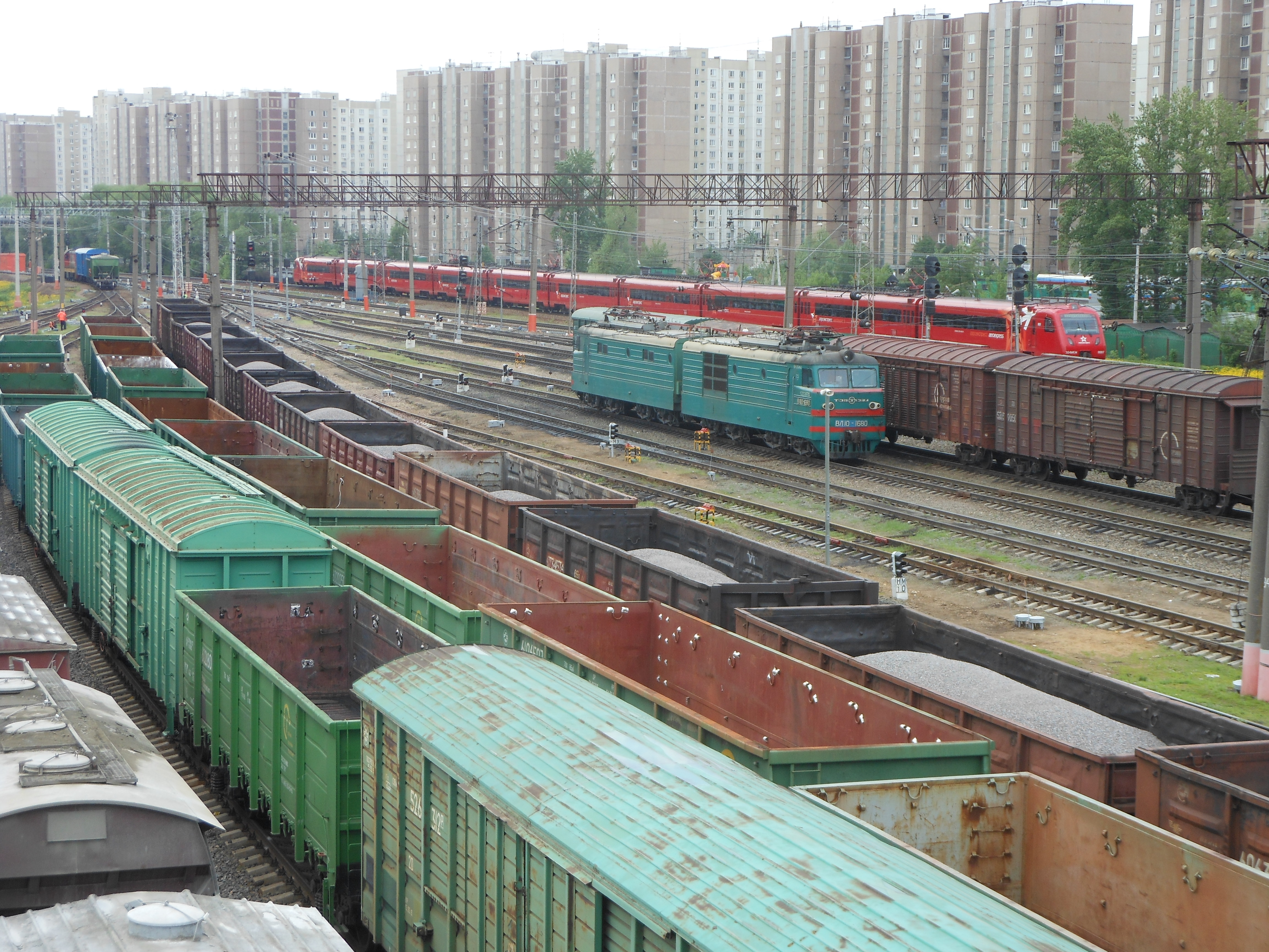 Станция Бескудниково